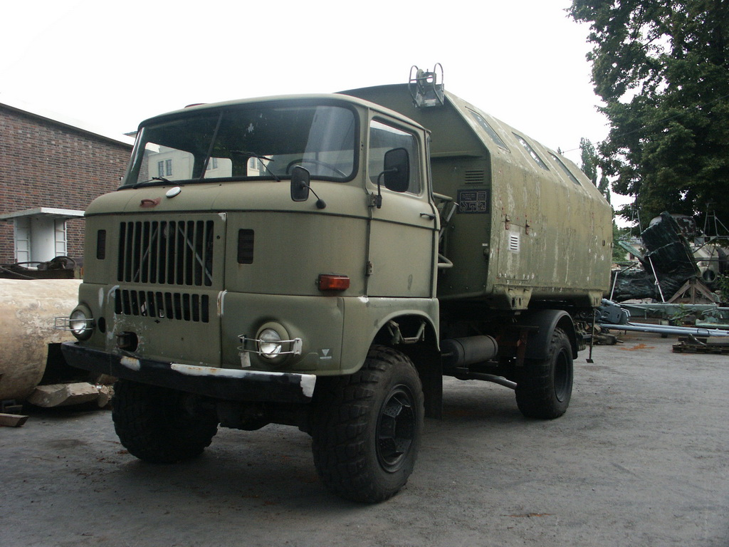 IFA W50 im Bundeswehrmuseum Dresden mit Teilen von der NVA